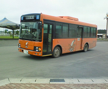 六戸町民バス車両（いすゞ・エルガミオ：KK-LR233J1） メイプルふれあいセンター（青森県上北郡六戸町）にて